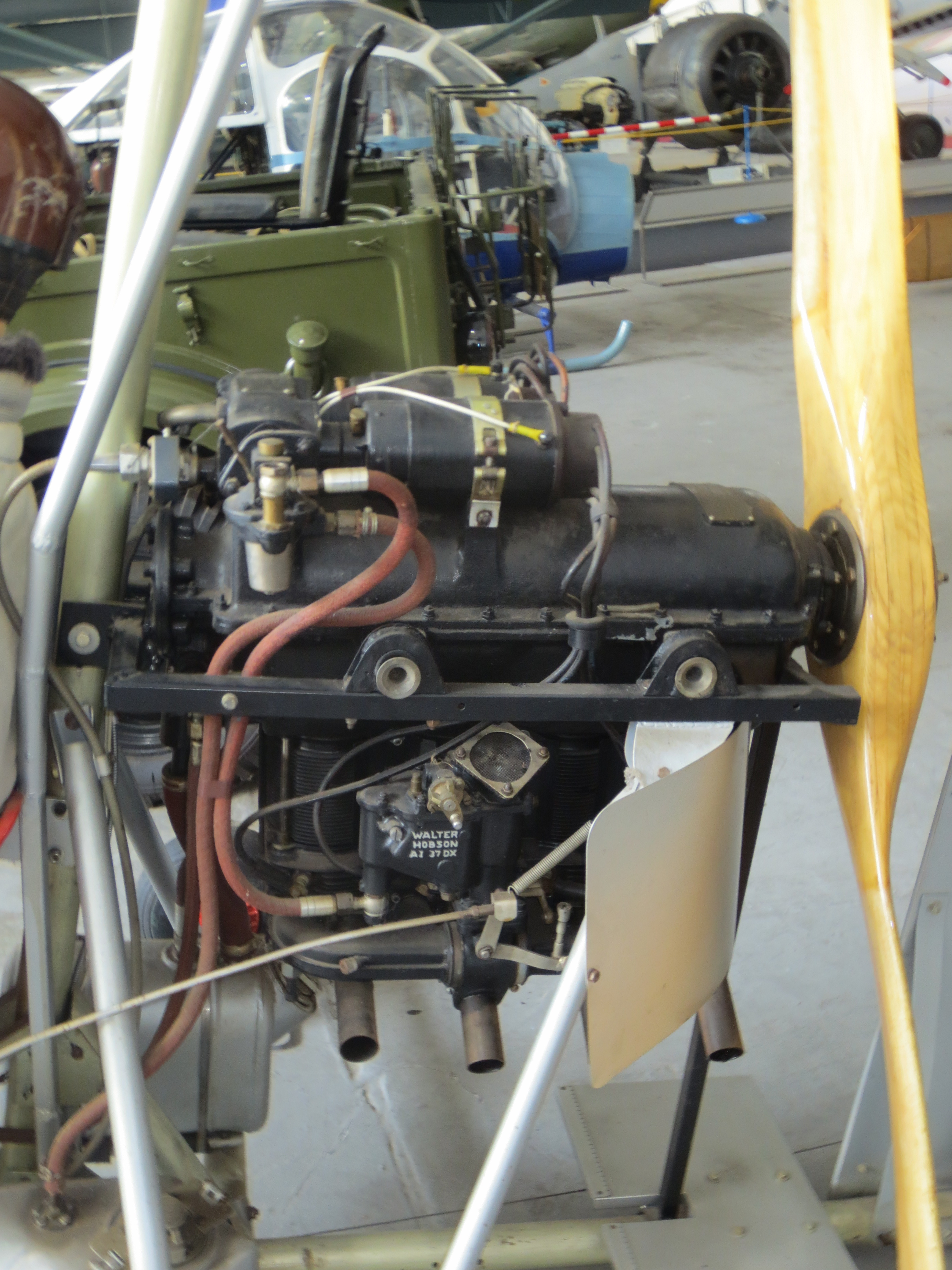 Vírník KD-67 Ideal s motorem Walter Mikron II, LM Kbely